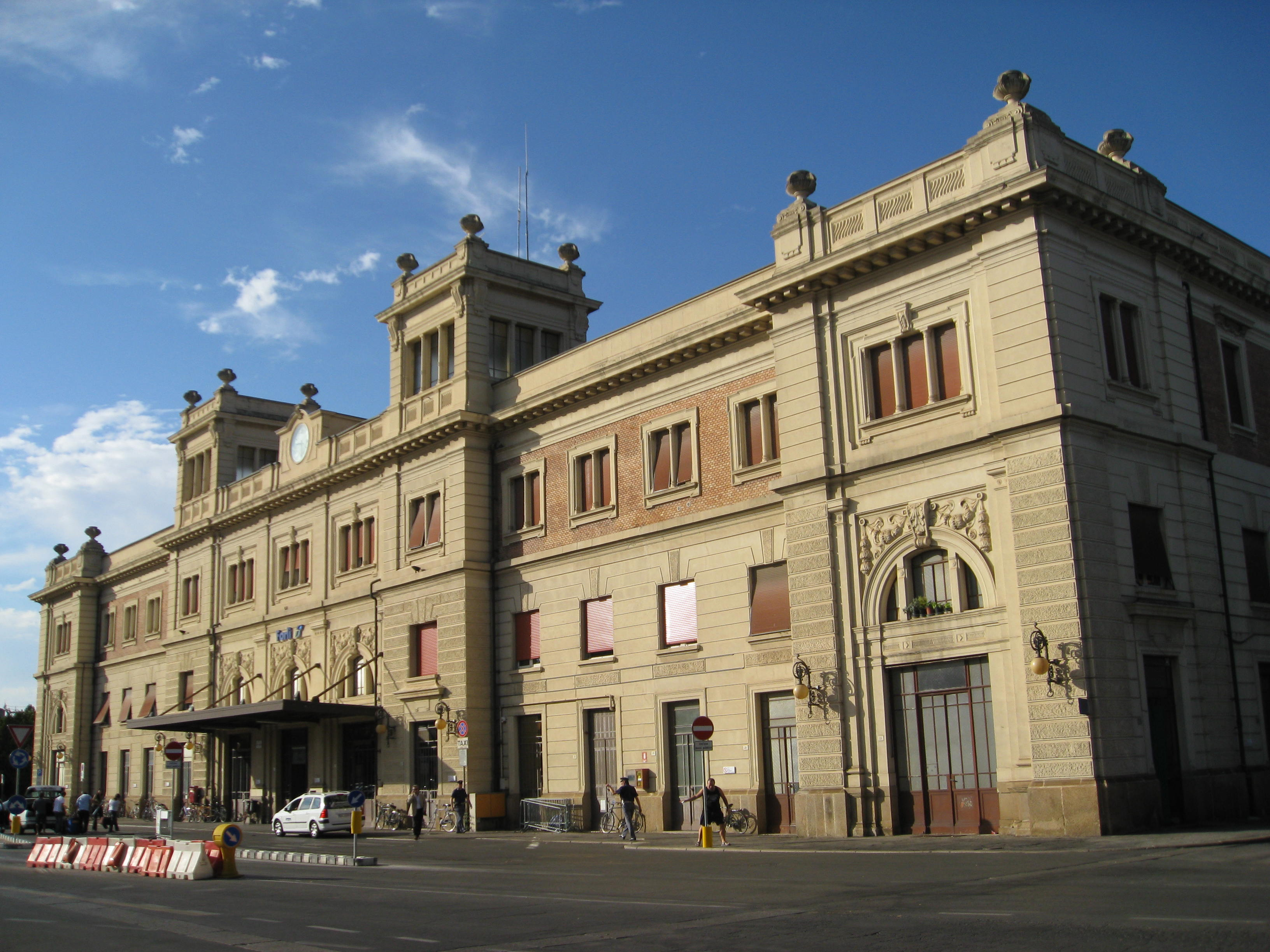 perkele, stazione ferroviaria di forlì